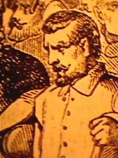 Gonzalo Pizarro, a Spanish conquistador of Peru